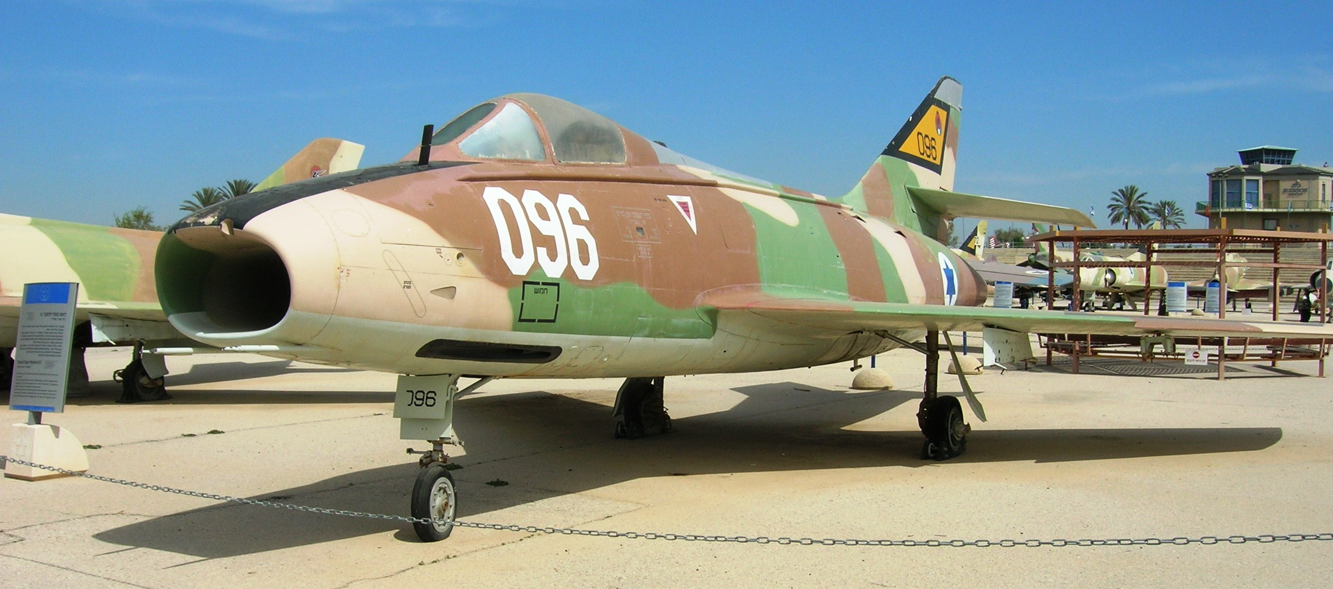 Dassault Super Mystere B-2